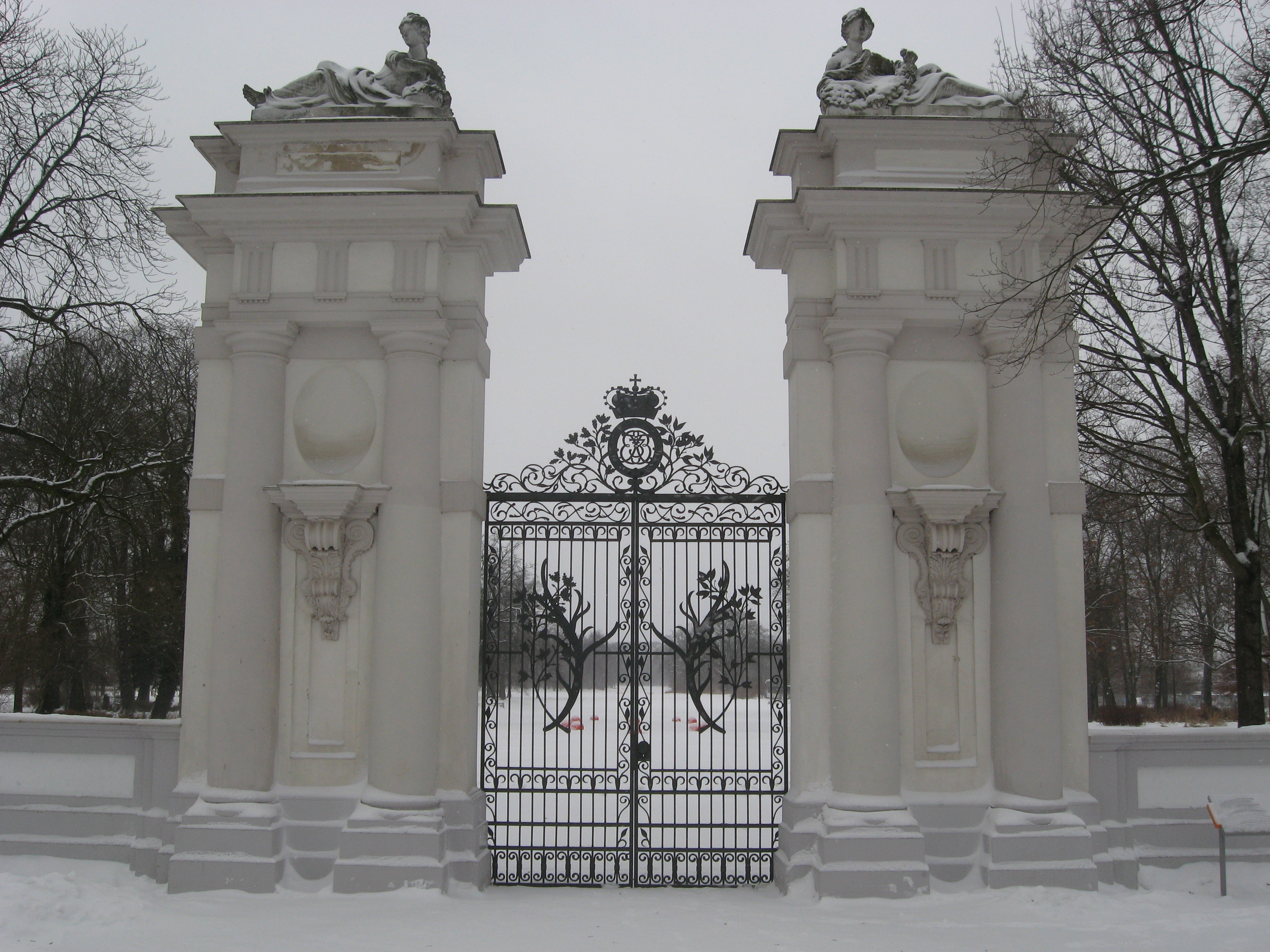 Tor des Schlossparks Oranienburg im Winter